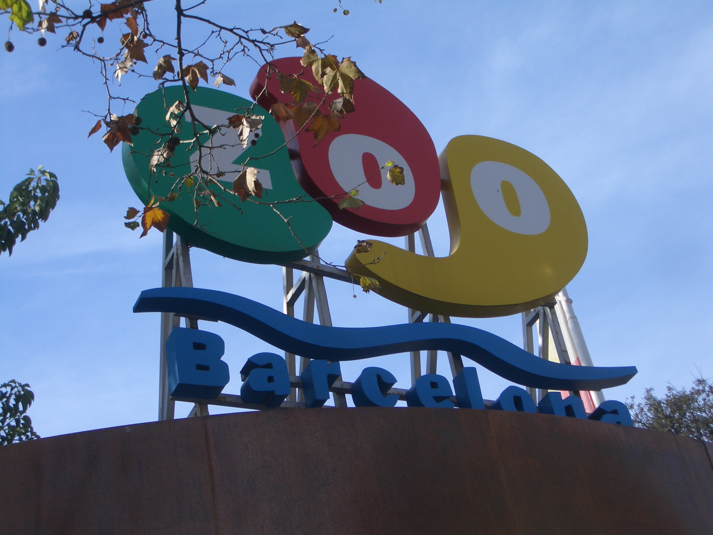 Cartel zoo Barcelona,España.